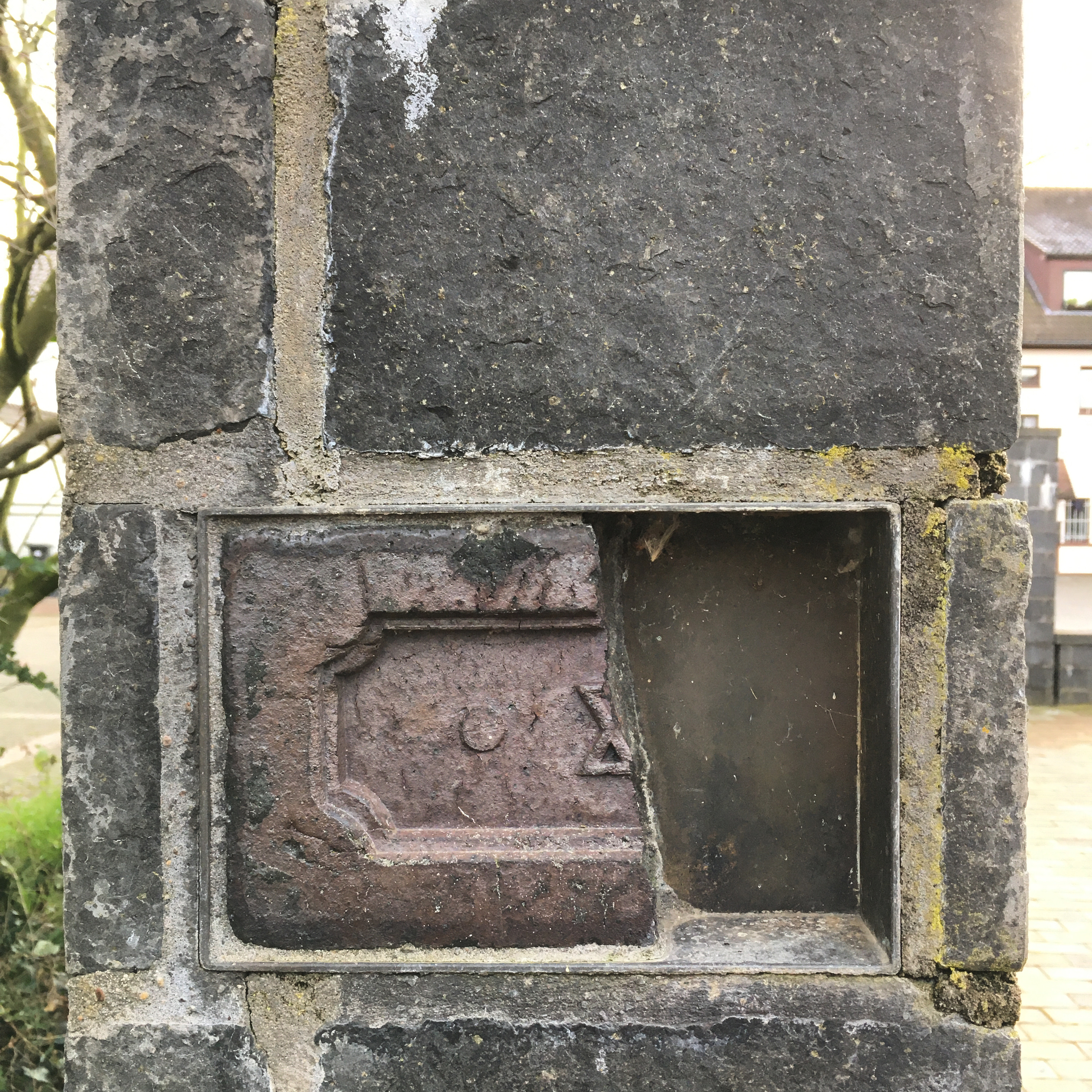 Herausgebrochener Davidstern am Mahnmal der ehemaligen Synagoge in Achim bei Bremen